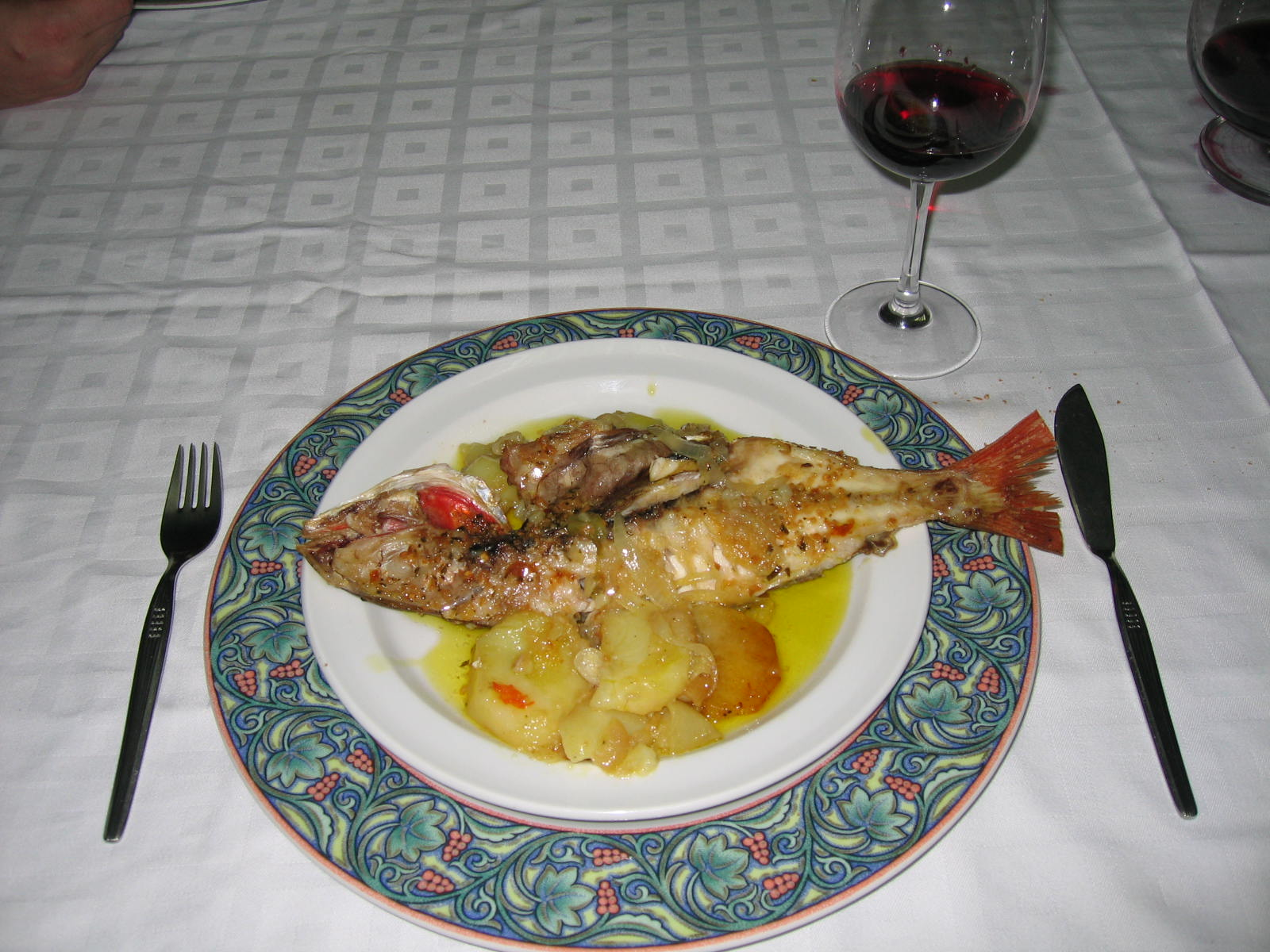 Besugo a la espalda en la Sociedad Gastronómica El Rinconín, Oviedo